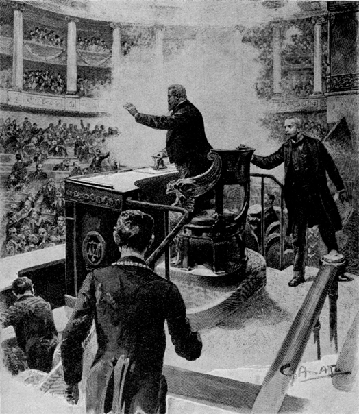 Imagem do atentado de Vaillant publicada em 1893 no jornal Le Petit Parisiensi em 1894.